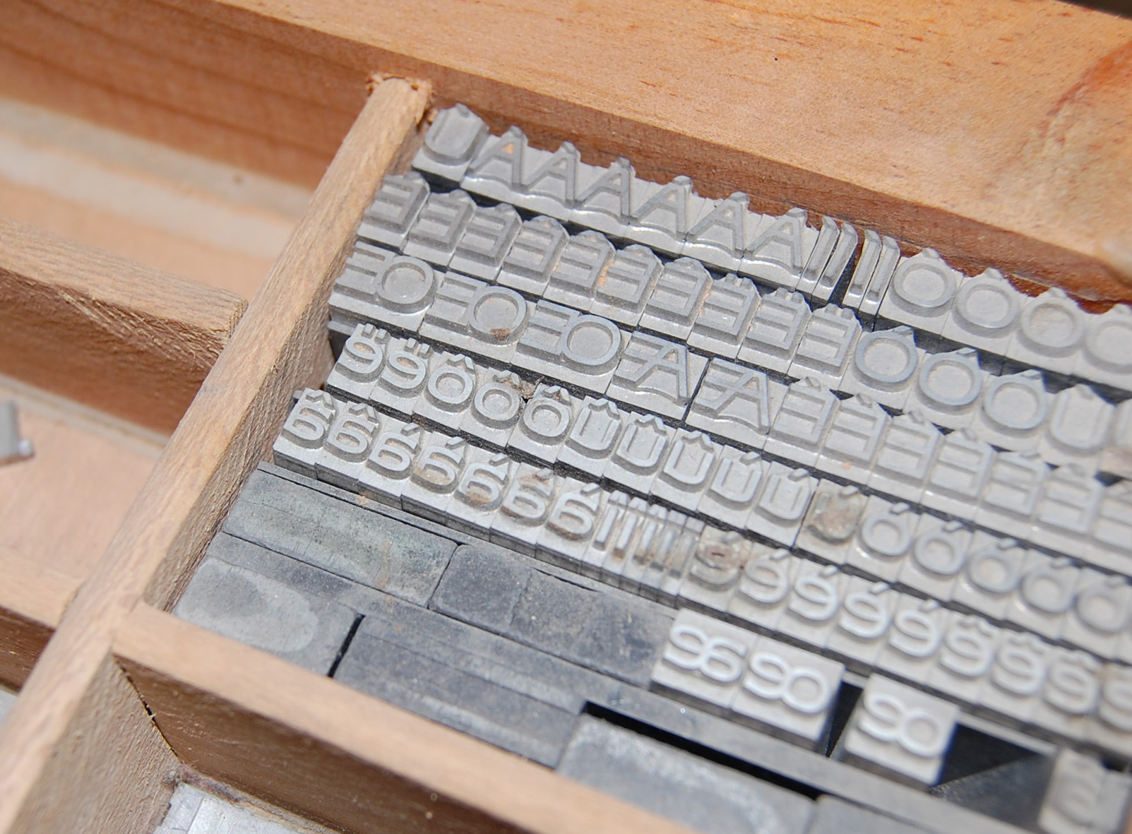 Tipus de plom per a màquines tipogràfiques